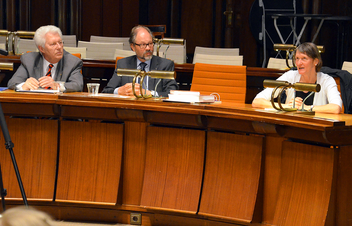 Im Rahmen der vom Freundeskreis Stadtarchiv Hannover veranstalteten Reihe "Gespräche mit Zeitzeugen" moderierte der Vorsitzende, Professor Carl-Hans Hauptmeyer im Hodlersaal des Neuen Rathauses zum Thema "Messen in Hannover: Ein Glücksfall der (Nachkriegs-)Geschichte ein öffentliches Interview mit Hubert-Helmut Lange, dem langjährigen Vorstandsmitglied der Deutschen Messe AG. Dabei erinnerte Cornelia Regin, Direktorin vom Stadtarchiv Hannover an im Stadtarchiv noch fehlende Dokumente und Archivalien aus der Geschichte der Deutschen Messe AG ...